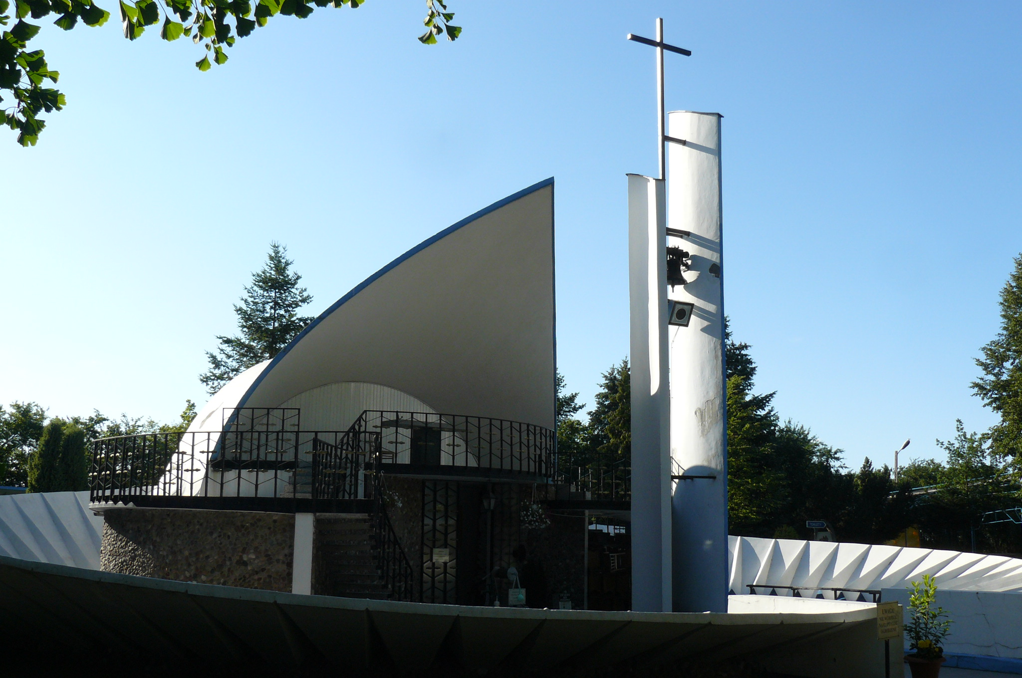 Studzienka w miejscu objawień MB w Piasecznie.